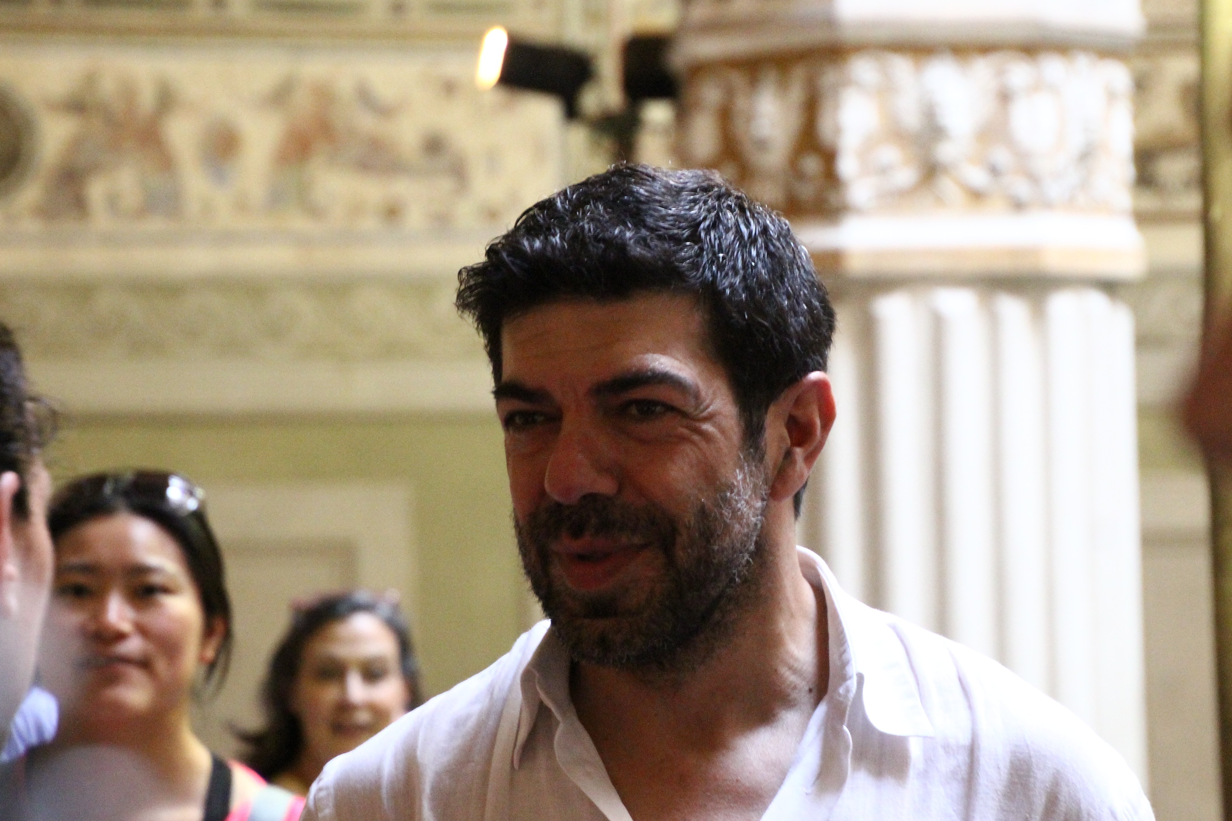 Pierfrancesco Favino